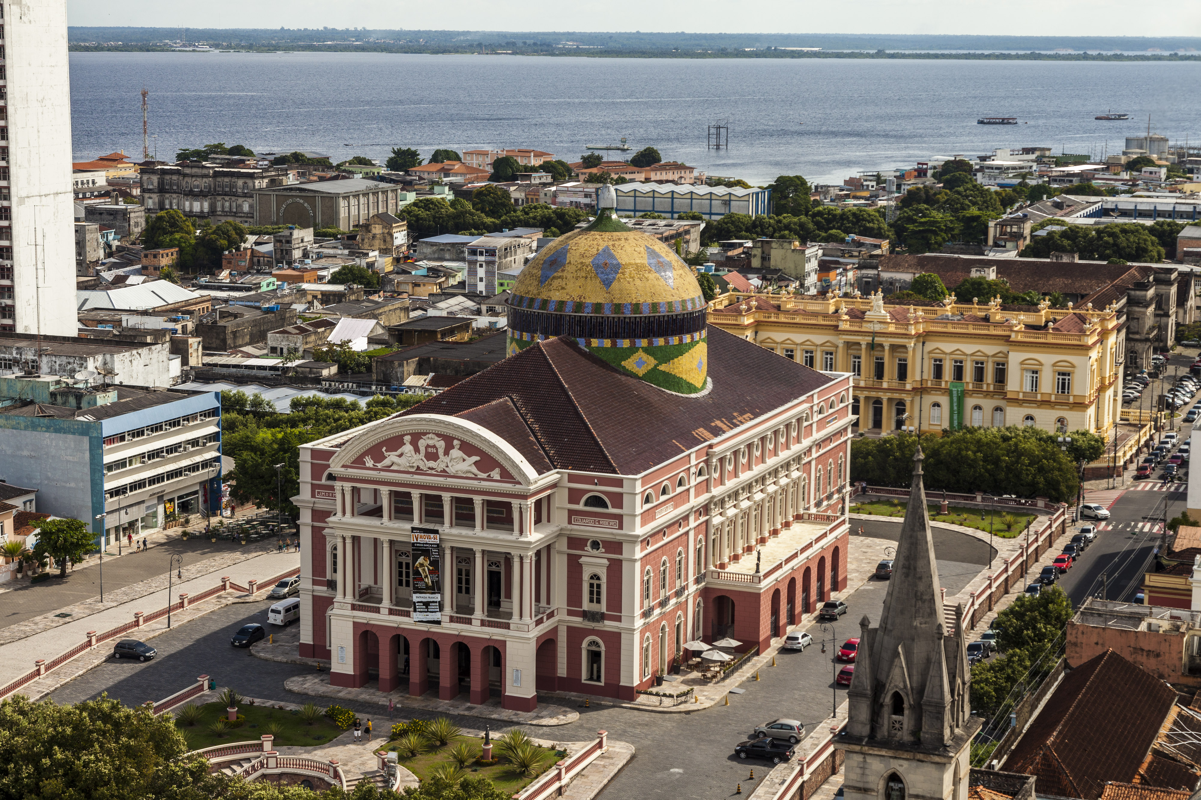 Vista aérea do Teatro Amazonas, em Manaus.